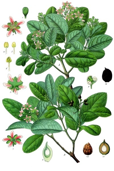 Boldo. A männliche Pflanze. B weibliche Pflanze mit Blüten und Früchten. 1 Knospe; 2 männliche Blüte von innen; 3 dieselbe von aussen; 4, 5, 6 Staubblätter; 7 weibliche Blüte von innen; 8 Pistill im Längsschnitt; 9 drei Fruchtstiele von dem Rest der Achsencupula umgeben; 10 Frucht; 11 Längsschnitt der Frucht; 12 Samen. A, B natürliche Grösse. 1-12 vergrössert.